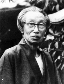 伊藤生更（Ito seiko） １８８４年（明治１７年）６月２８日 ～１９７２年（昭和４７年）７月２７日